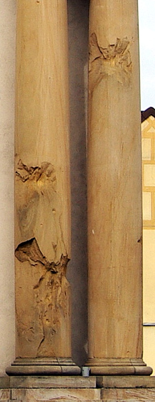 Frankenthal Speyerer Tor, Einschüsse von 1794